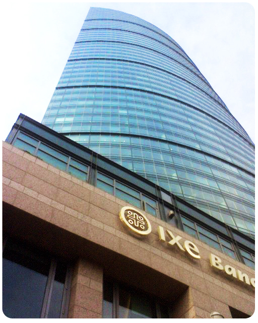 Torre IXE